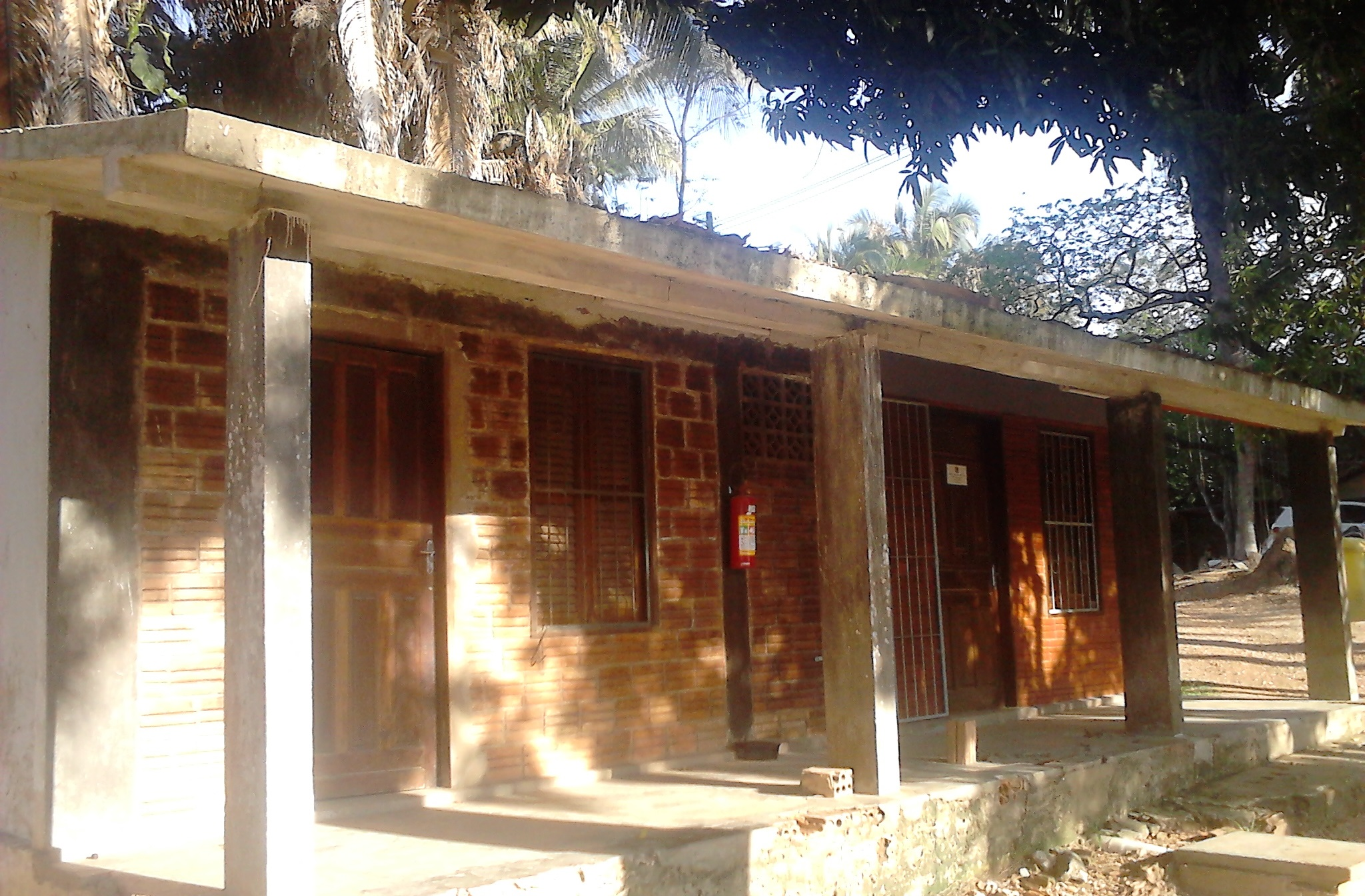 Antiga construção do CAUSP no campus II da Unifesspa, em Marabá.